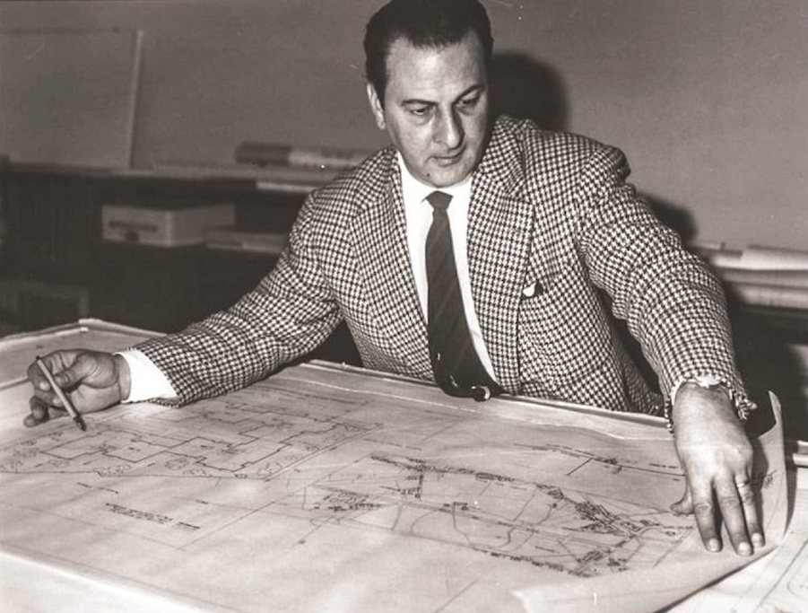 Fotografia di Carlo Migliardi Architeto al lavoro.